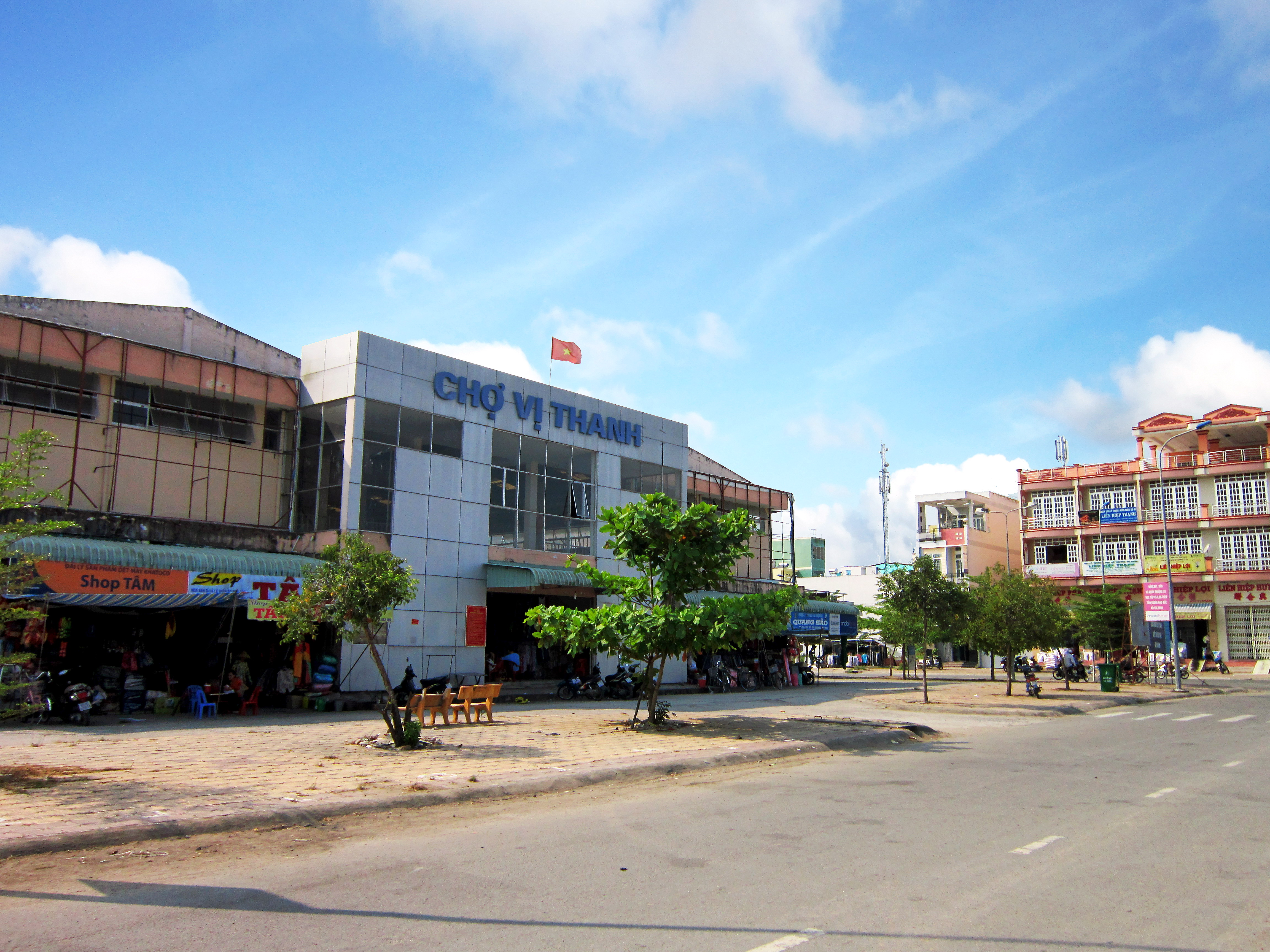 Chợ Vị Thanh ở tại TP. Vị Thanh, tỉnh Hậu Giang, Việt Nam.